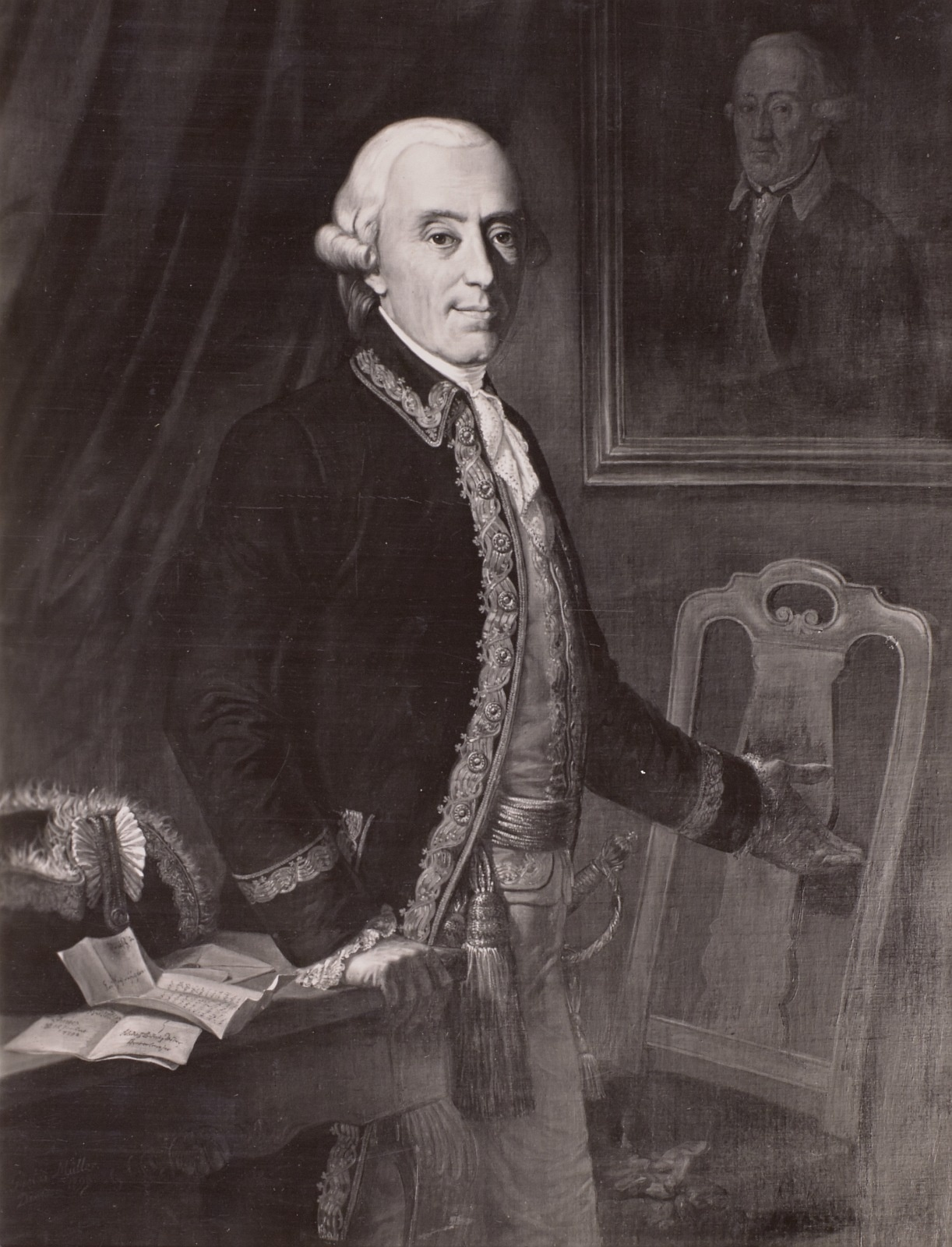 Friedrich Ludwig Aster (1732-1804), Generalmajor und Kommandant des Ingenieurkorps, verm. Kopie nach älterem Gemälde